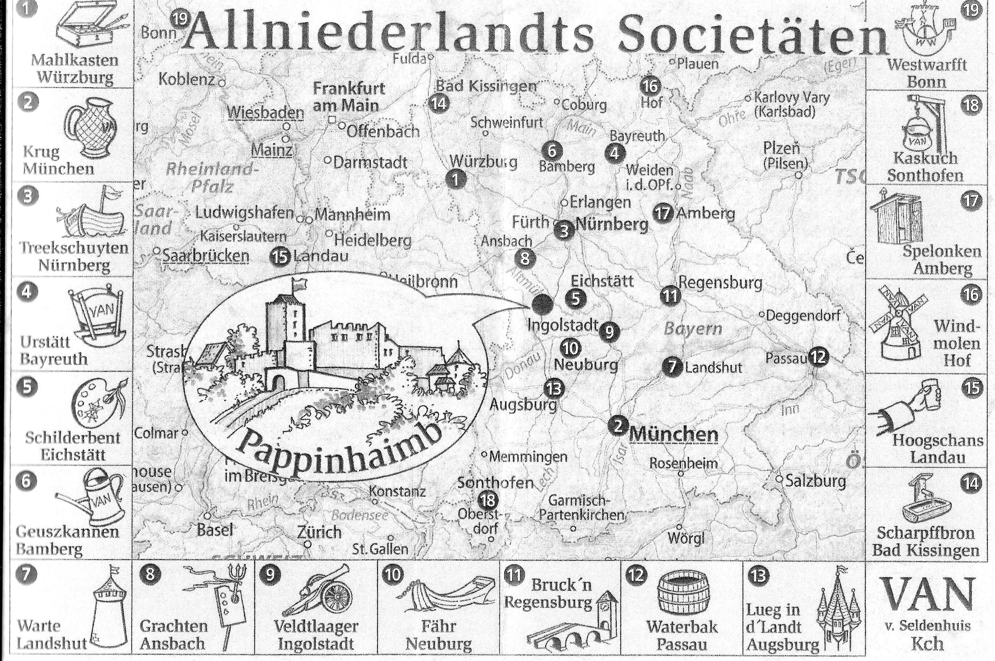 Karte, der 20 Societäten der Niederlandt Gesellschaft in Deutschland